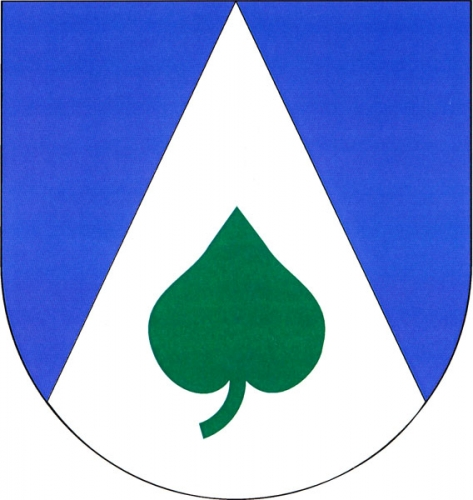 znak, Rodkov, okres Žďár nad Sázavou